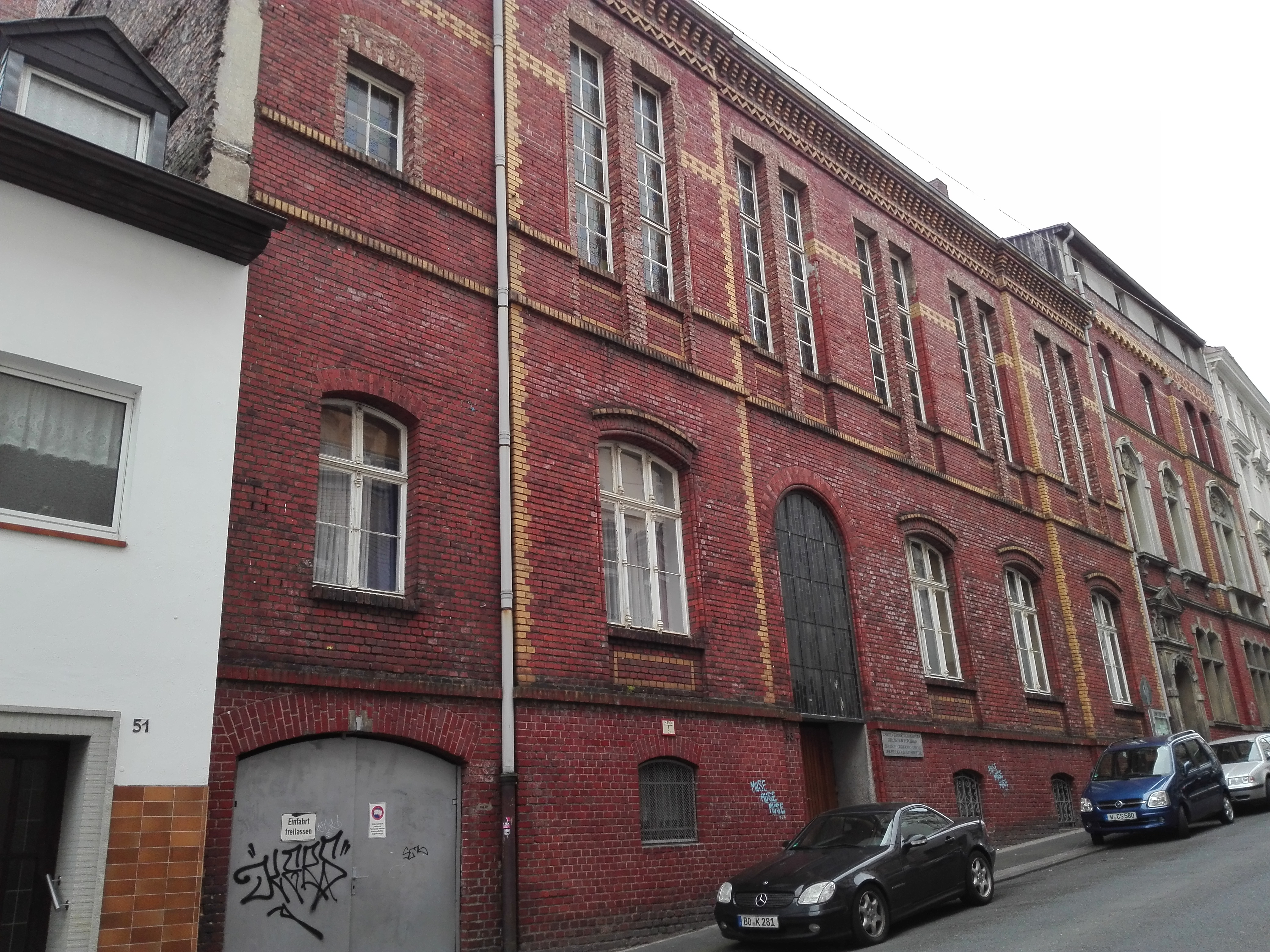 Ansichten der serbisch-orthodoxen Kirche in Wuppertal-Elberfeld, vormals Lutherkirche